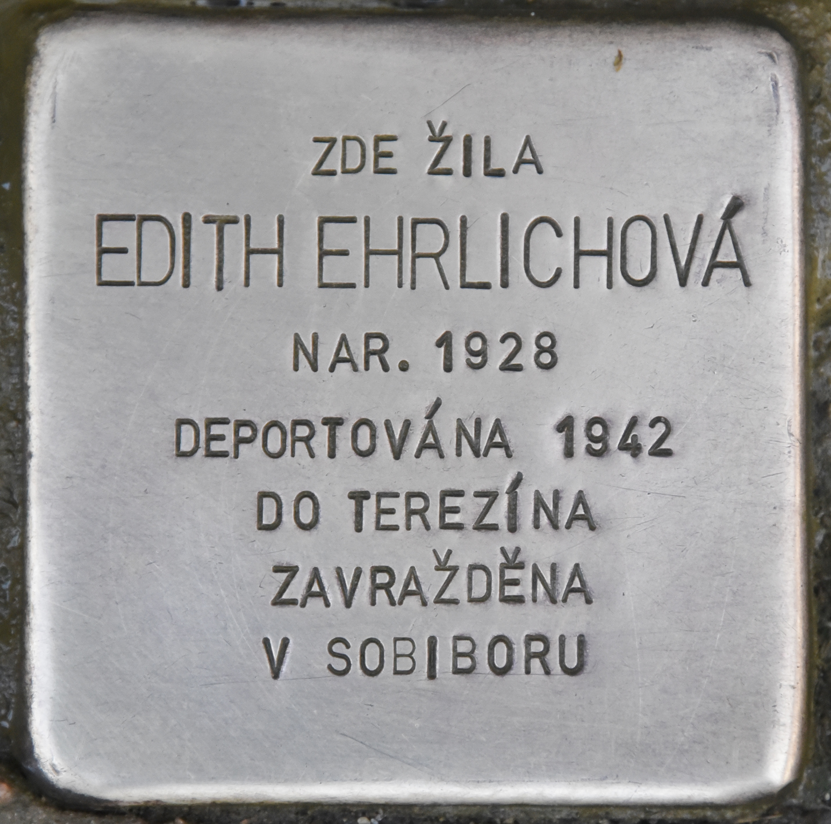 Stolperstein für Edith Ehrlichova